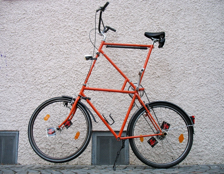 Tallbike